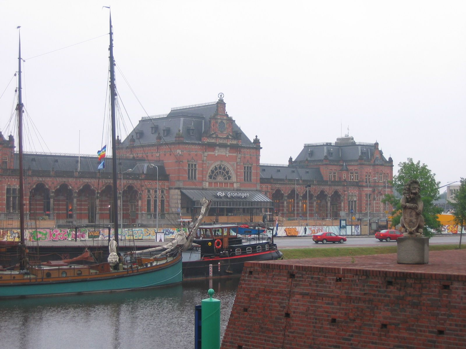 Foto gemaakt door Fruggo, 25 juli 2005, Groningen, Nederland. Het (hoofd)station van Groningen gezien vanaf het Museumeiland. Men is druk bezig om het plein voor het station te renoveren ("het stadsbalkon"); op de afrastering is graffity aangebracht. Voor het station loopt het Verbindingskanaal. Daarin liggen al enkele boten voor de komende editie van de Groninger Welvaart (28 t/m 31 juli 2005). Categorie:Afbeelding spoorwegstation in Nederland